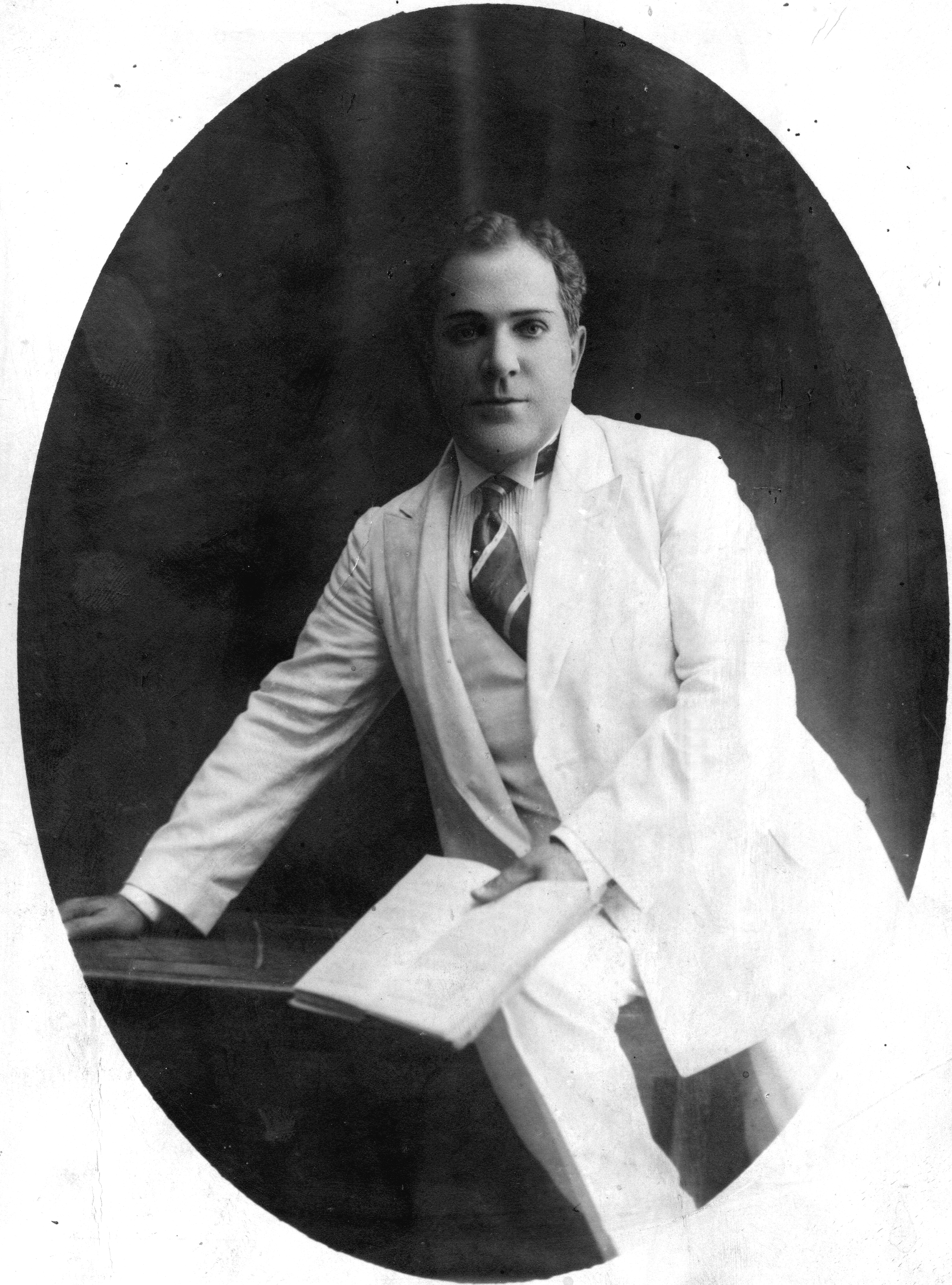 Пётр Иванович Словцов